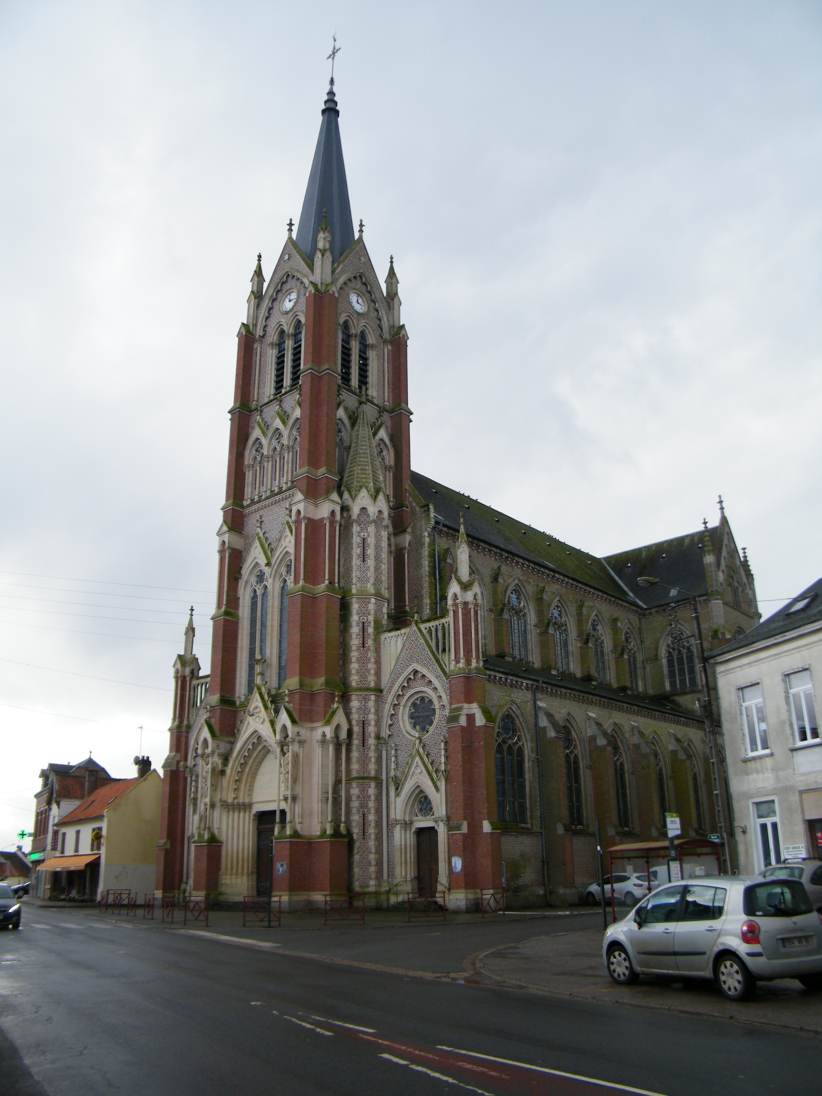 église.